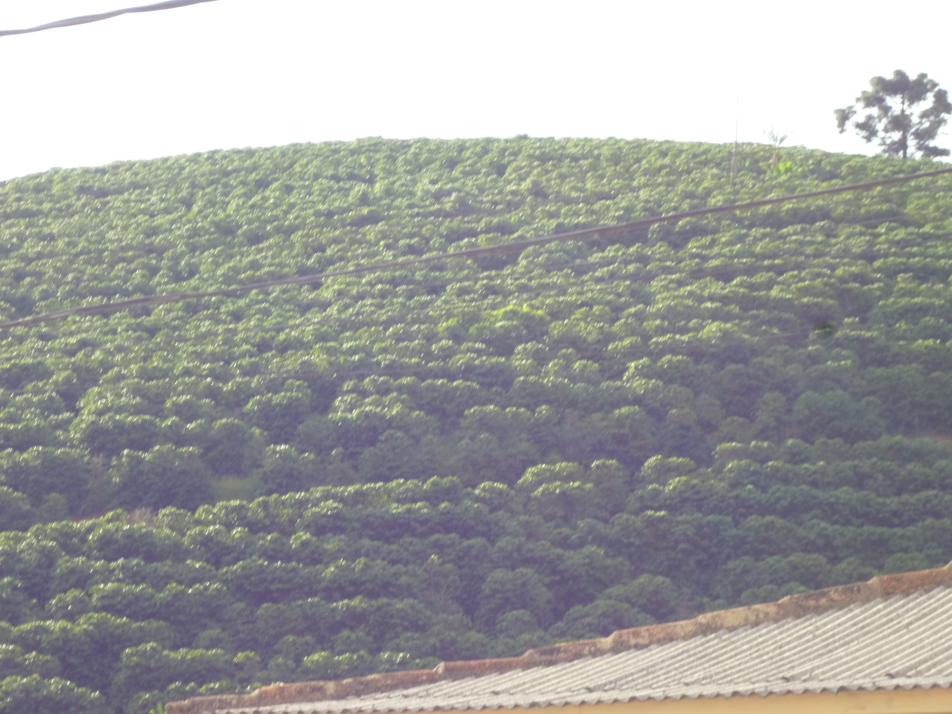 Alto Caparaó MG Brasil - Cafezal